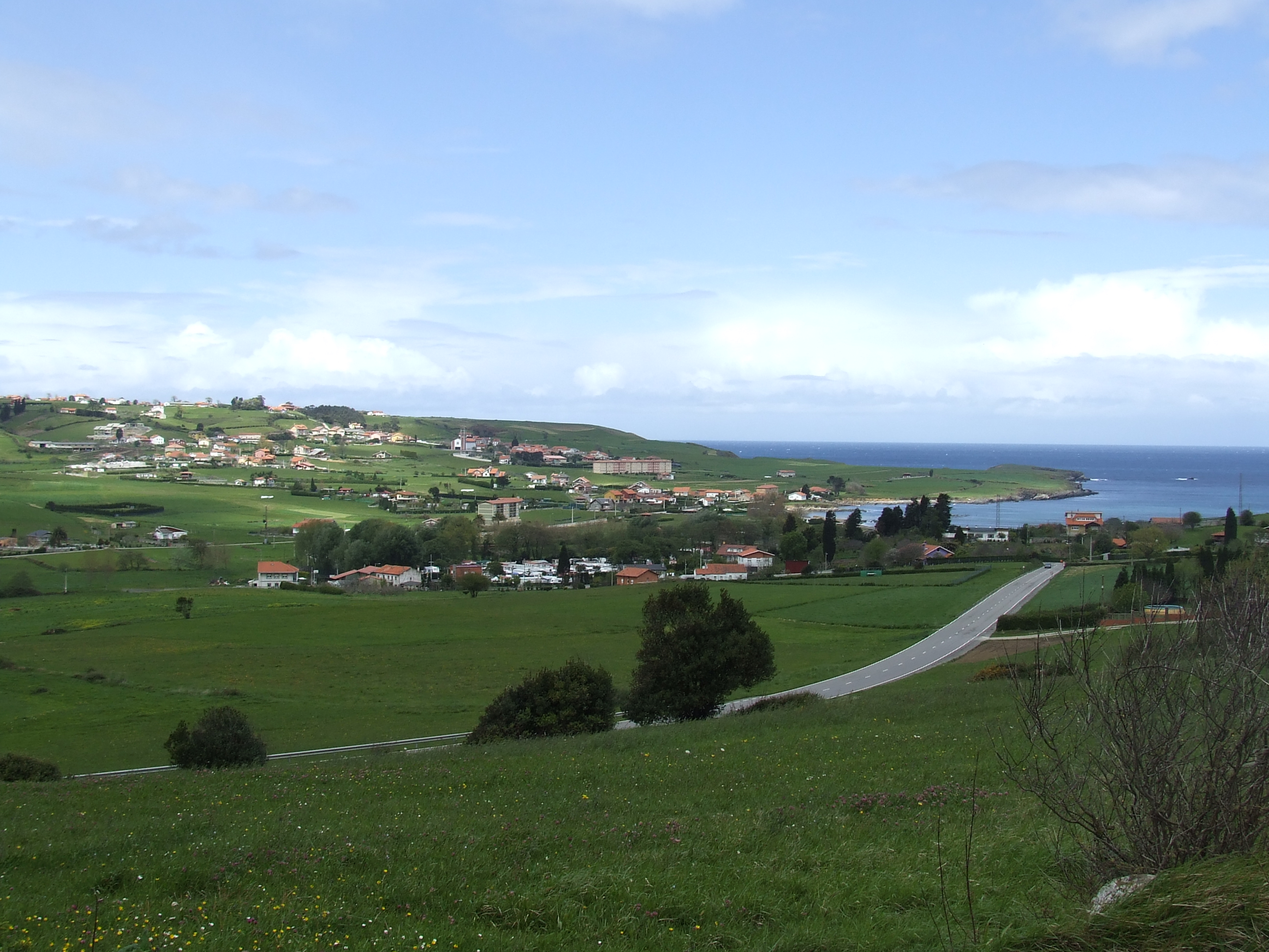 Bañugues